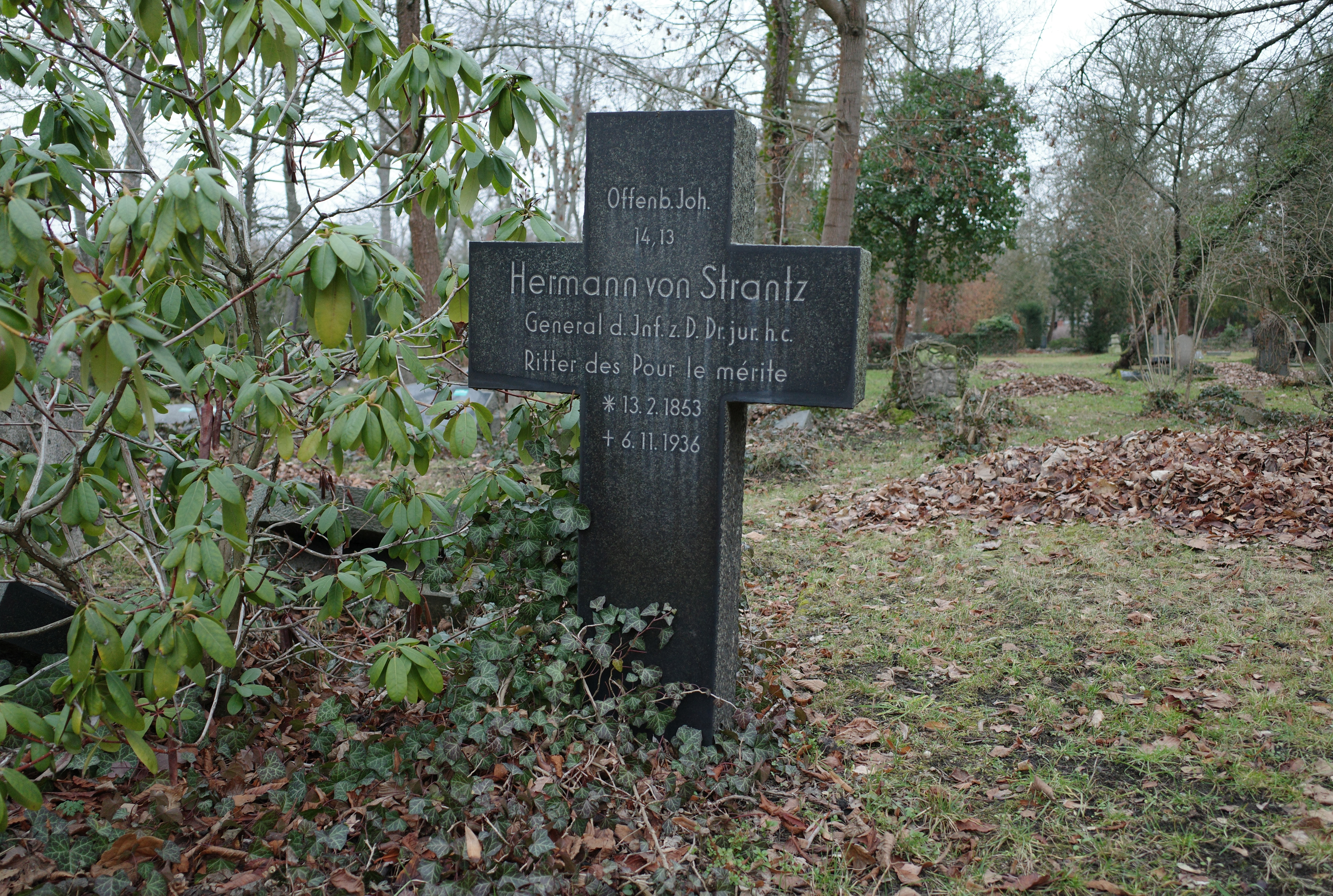 Dessau-Roßlau, Ruhestätte von Hermann von Strantz auf dem Friedhof 3.